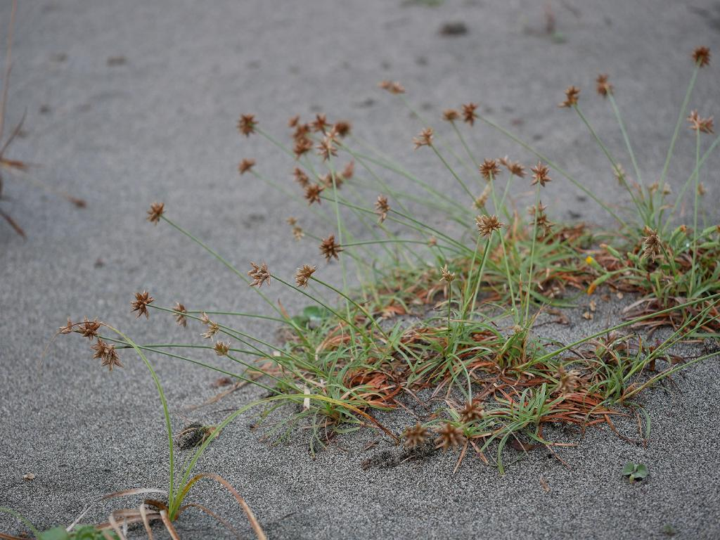 2019/09/19 静岡県：Shizuoka Pref., Japan